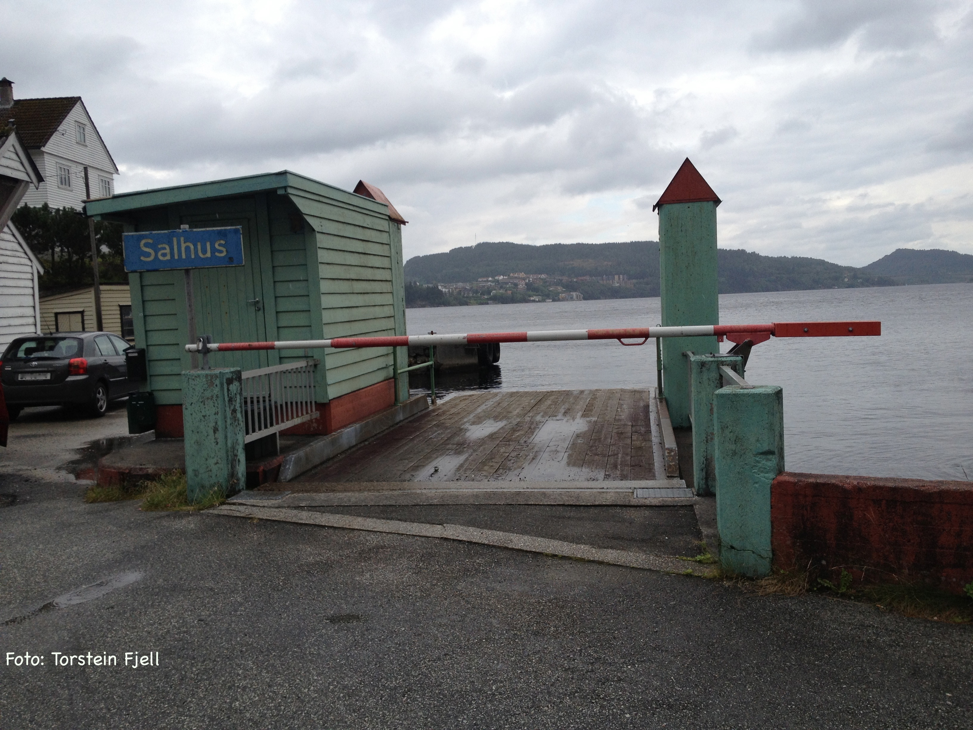 Salhus ferjekai i Bergen. Den eneste fredet ferjekaien i Norge.